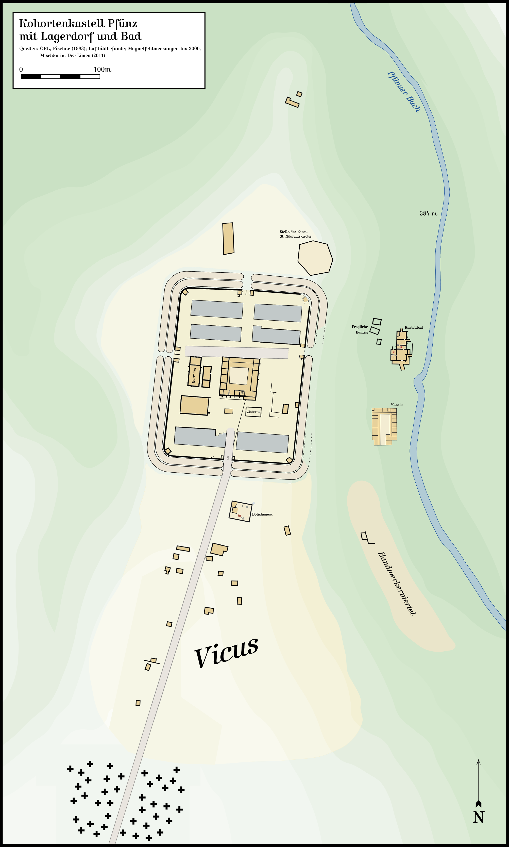 Lageplan und Gebäude des Kastells Vetoniana (Raetia), des Vicus und der Gräber nach den Befunden der Reichslimeskommission von 1884 bis 1900, Fischer (1983), Luftbildbefunden sowie den geomagnetischen Messungen des Jahres 2000 und 2010.